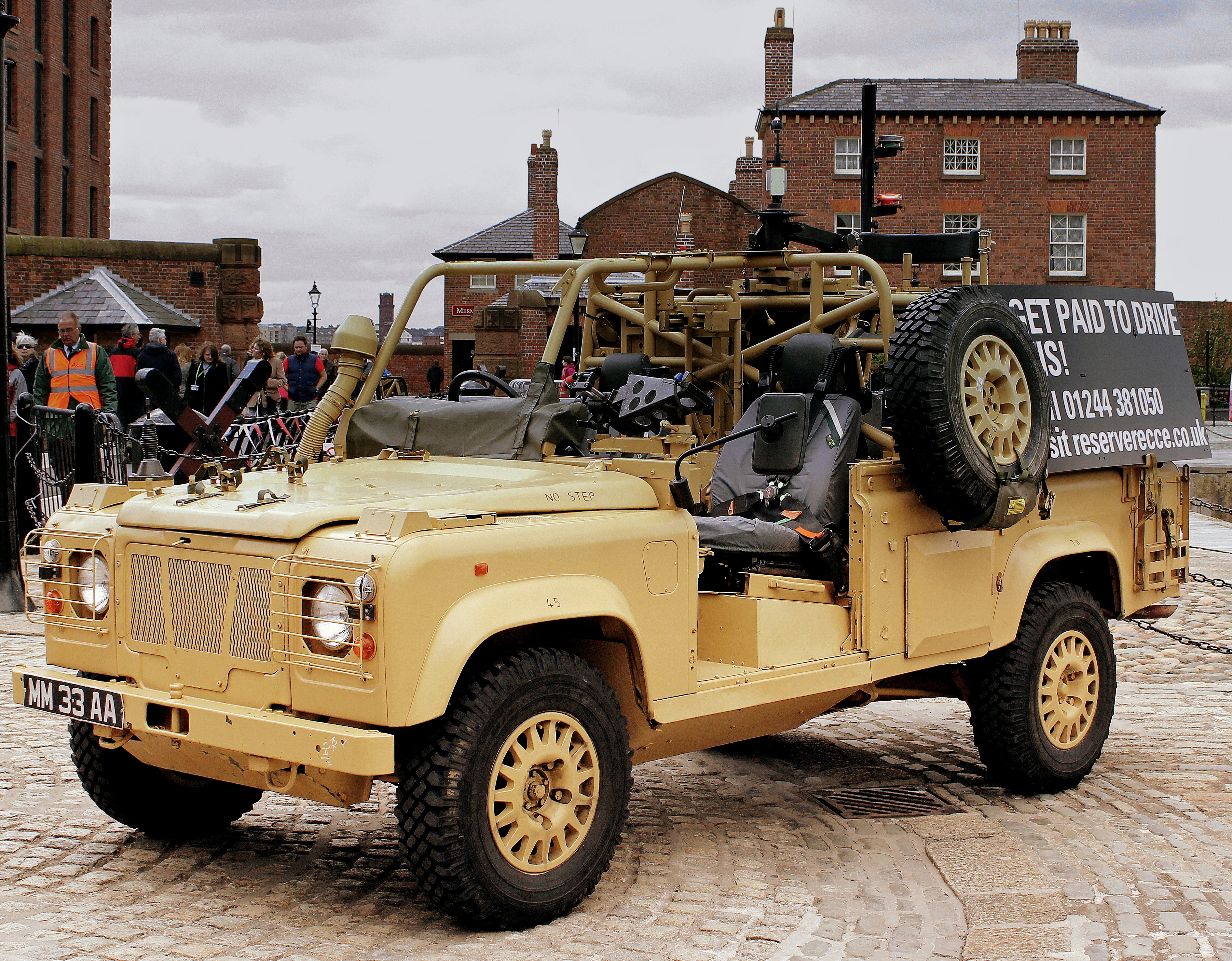 BRITISH ARMY MOD SPEC LAND ROVER PATROL VECHICLE ALBERT DOCK LIVERPOOL MAY 2013